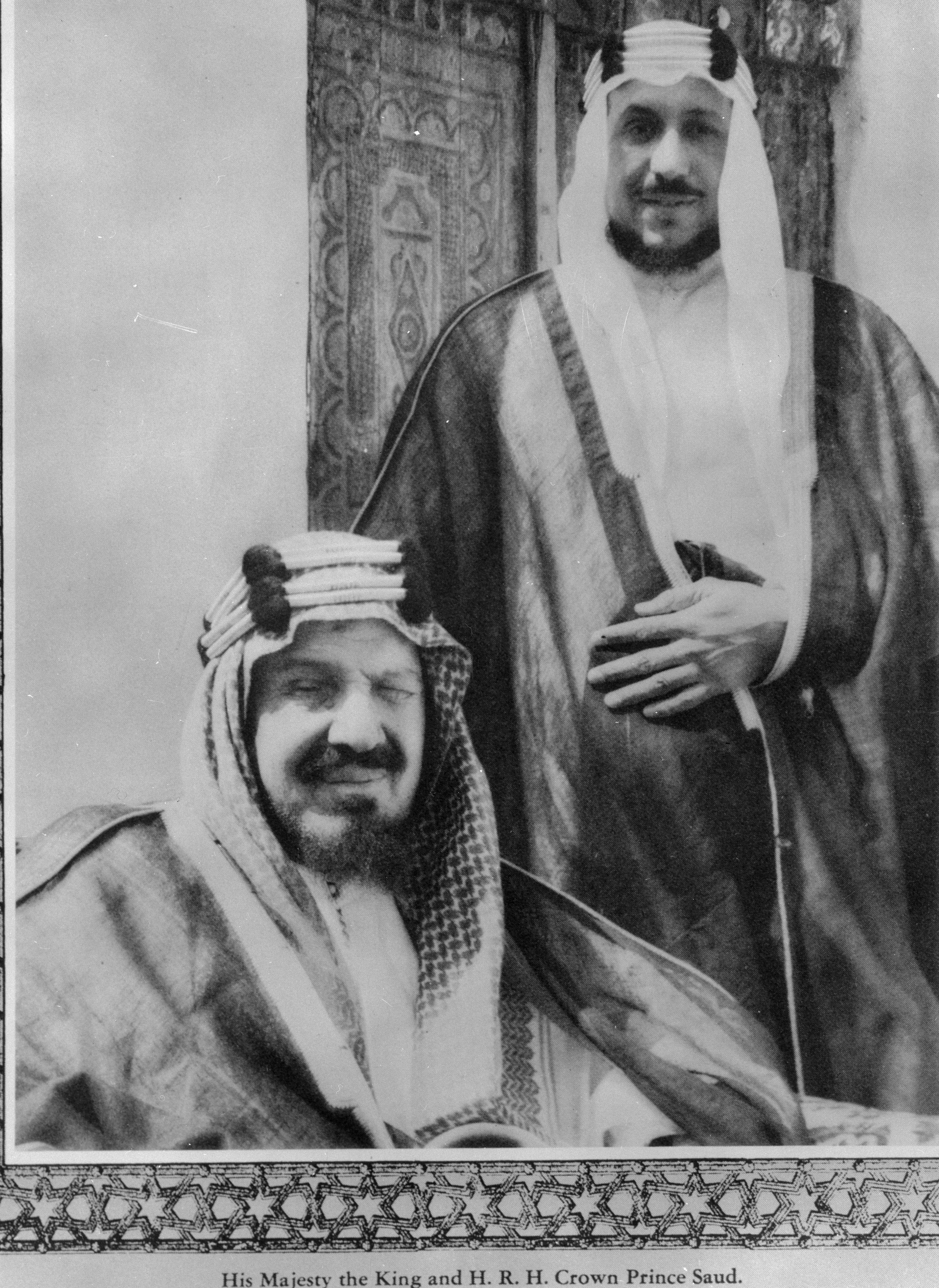 Collectie / Archief : Fotocollectie Van de Poll Reportage / Serie : Reproductiefotografie Beschrijving : Foto van een afbeelding van een portret van Ibn Saud en een van zijn zonen Annotatie : Abdul-Aziz ibn Abdul-Rahman al Faisal al Saud (1880 - 1953) was de stichter van Saudi Arabia Datum : ongedateerd Locatie : Syrië Trefwoorden : koningen, portretten, prinsen Persoonsnaam : Abdul Aziz Ibn Saud (koning Saudi Arabië) Fotograaf : Poll, Willem van de Auteursrechthebbende : Nationaal Archief Materiaalsoort : Negatief (6x6) Nummer archiefinventaris : bekijk toegang 2.24.14.02 Bestanddeelnummer : 254-3683